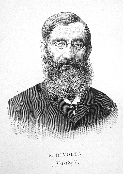 Sebastiano Rivolta,(1832-1893), professeur à l'École vétérinaire de Turin puis à l'Institut vétérinaire de Pise, dessiné par Louis Georges Neumann